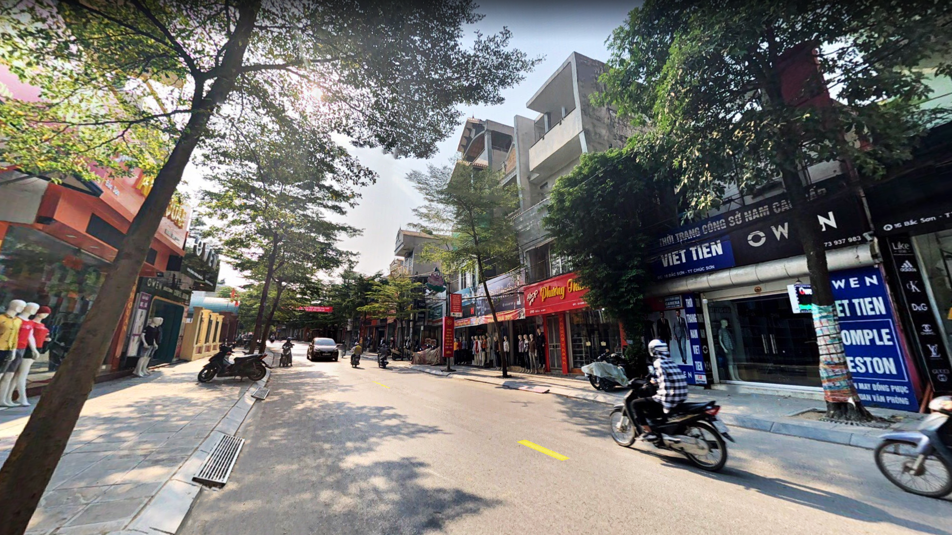 Chúc Sơn, Chương Mỹ, Hà Nội